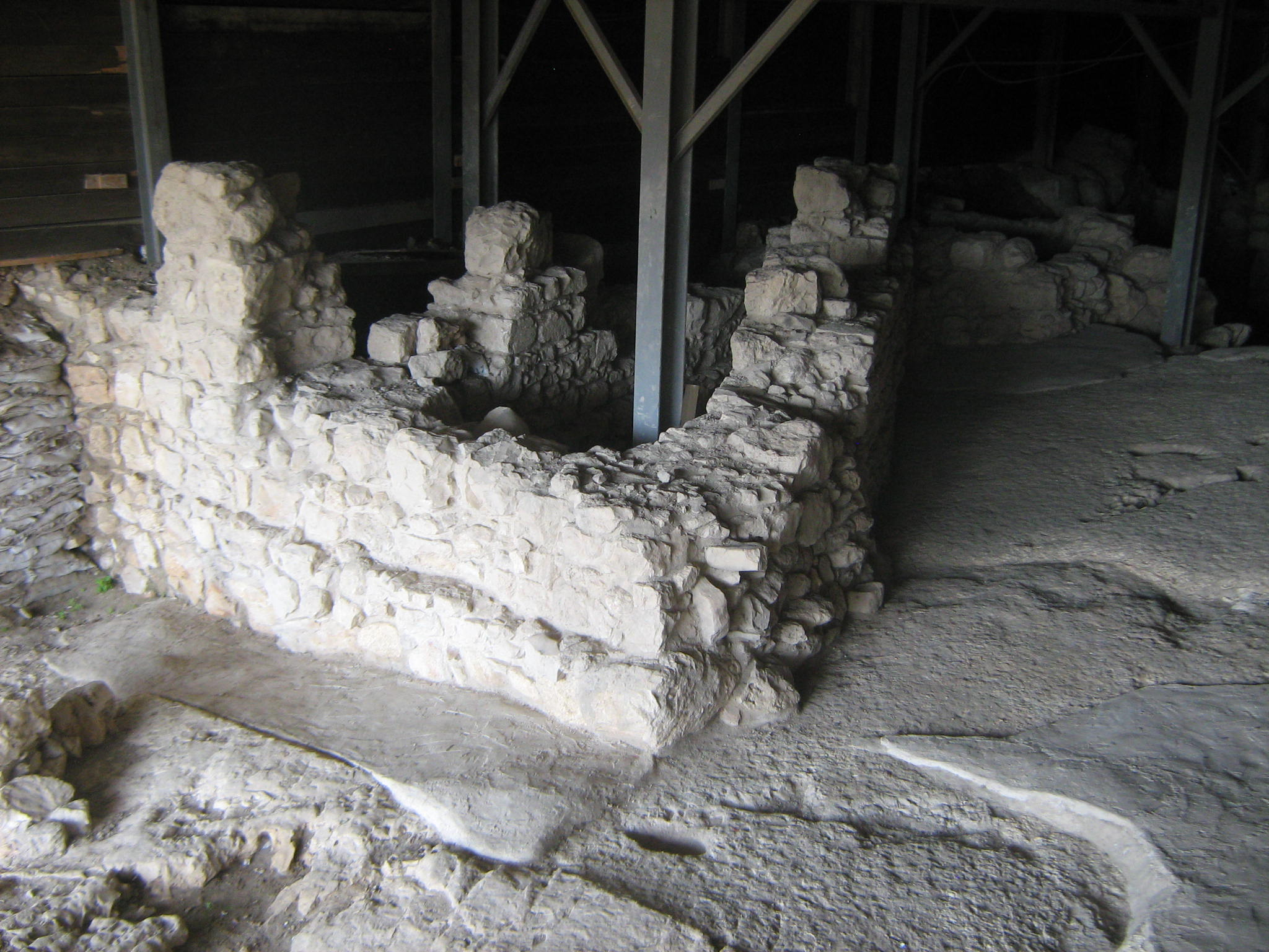 Город Давида-большое каменное строение (дворец царя Давида?)